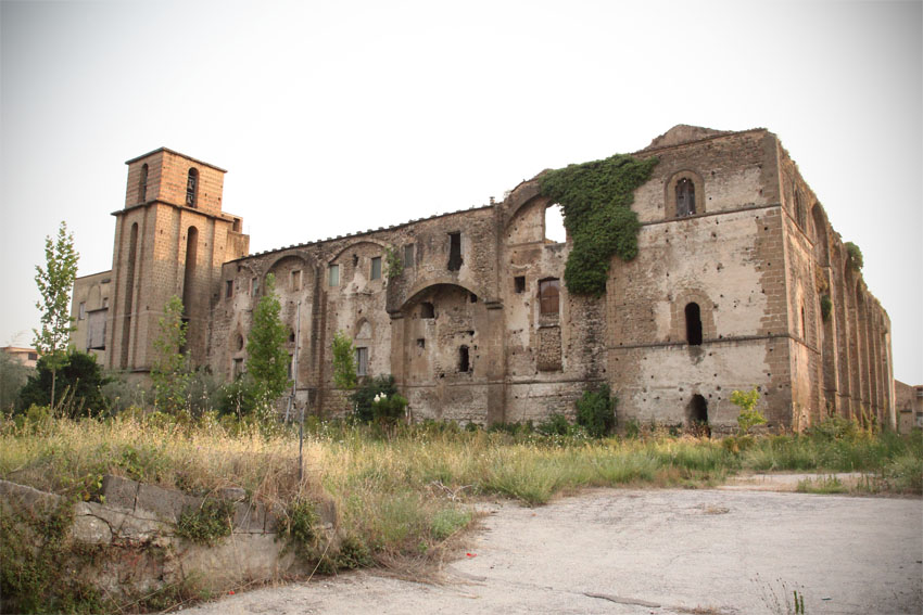 Il Castello Normanno di Casaluce è stata la prima fortezza pietrificata costruita dai Normanni dopo che ebbero il dominio su quella vasta porzione d'Italia che per i prossimi ottocento anni avrà il nome di Regno di Napoli e di Sicilia prima e Regno delle Due Sicilie successivamente. La data costruzione è attestata tra il 1030 e il 1060. Nei secoli successivi subì molte trasformazioni e fu adattato a struttura conventuale per l'ordine dei benedettini.